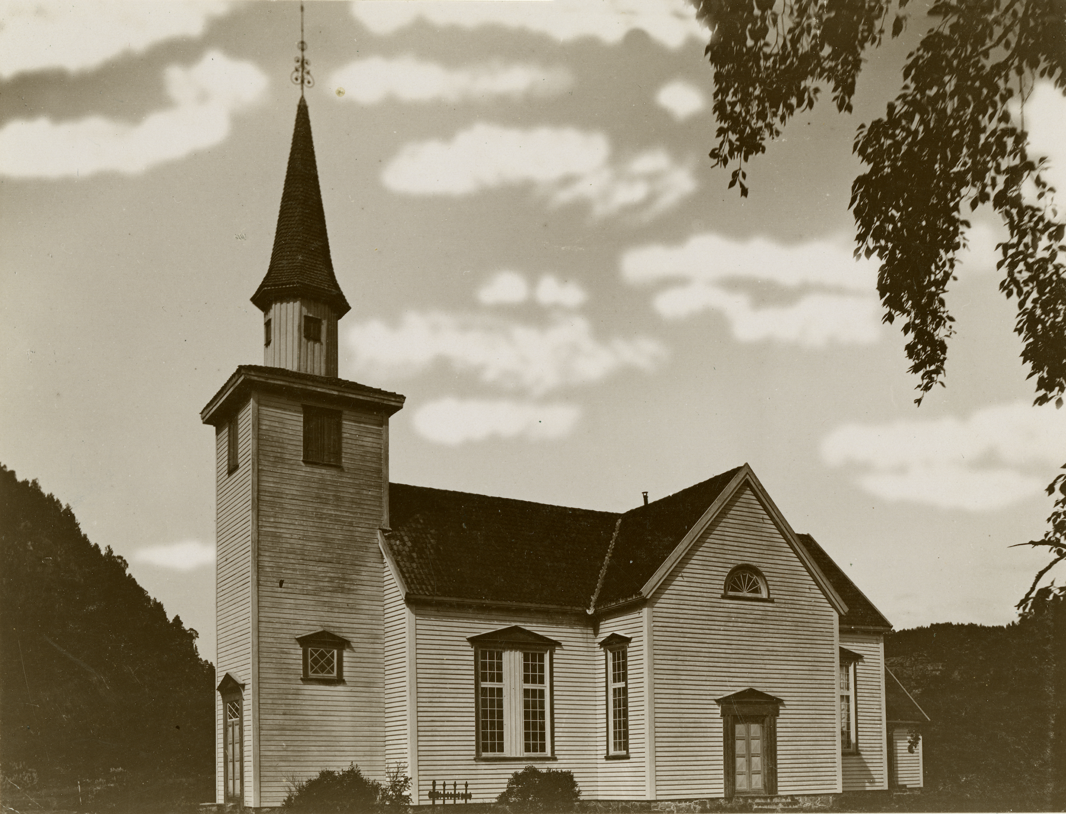 Vigmostad kirke i Vigmostad, Vest-Agder This image on crowdsourcing geotagging platform Fotodugnad